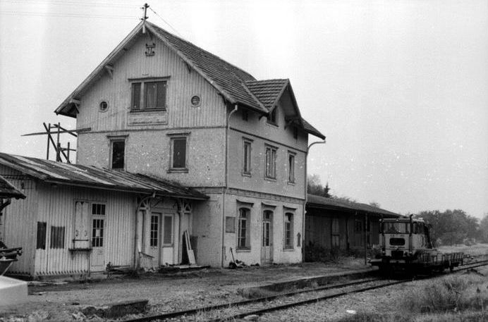 Bauzug im Bahnhof von Gerabronn beim Austausch der Telegrafenmasten (1987).